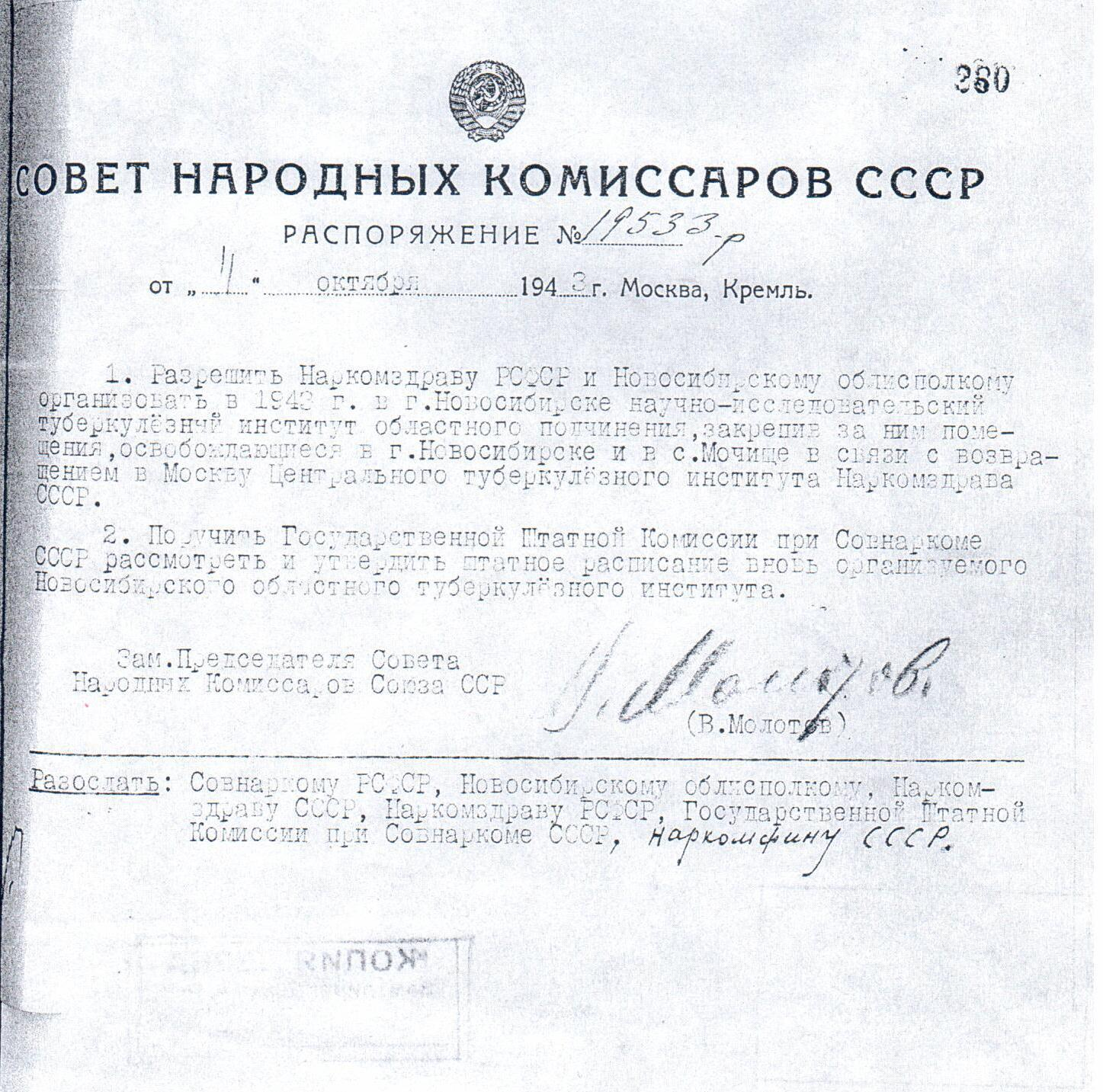 Распоряжение Совнаркома СССР �от 4 октября 1943 г. №19533-р